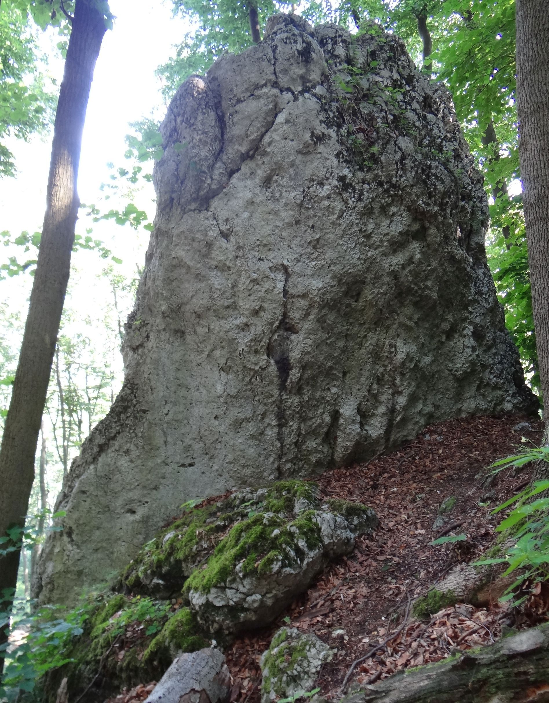 Plaskolec w Lesie Zabierzowskim w Kochanowie